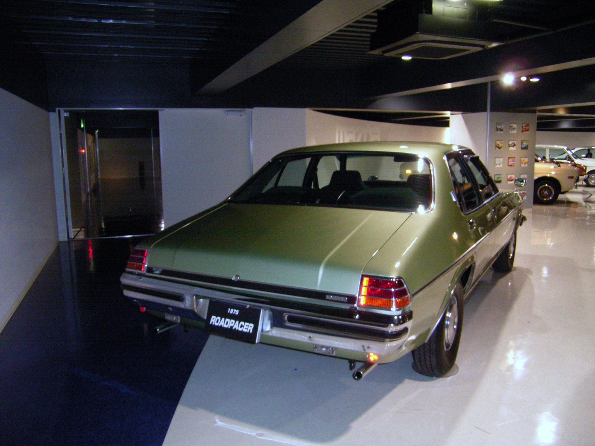 Mazda ROADPACER(マツダ・ロードペーサー),Mazda Museum